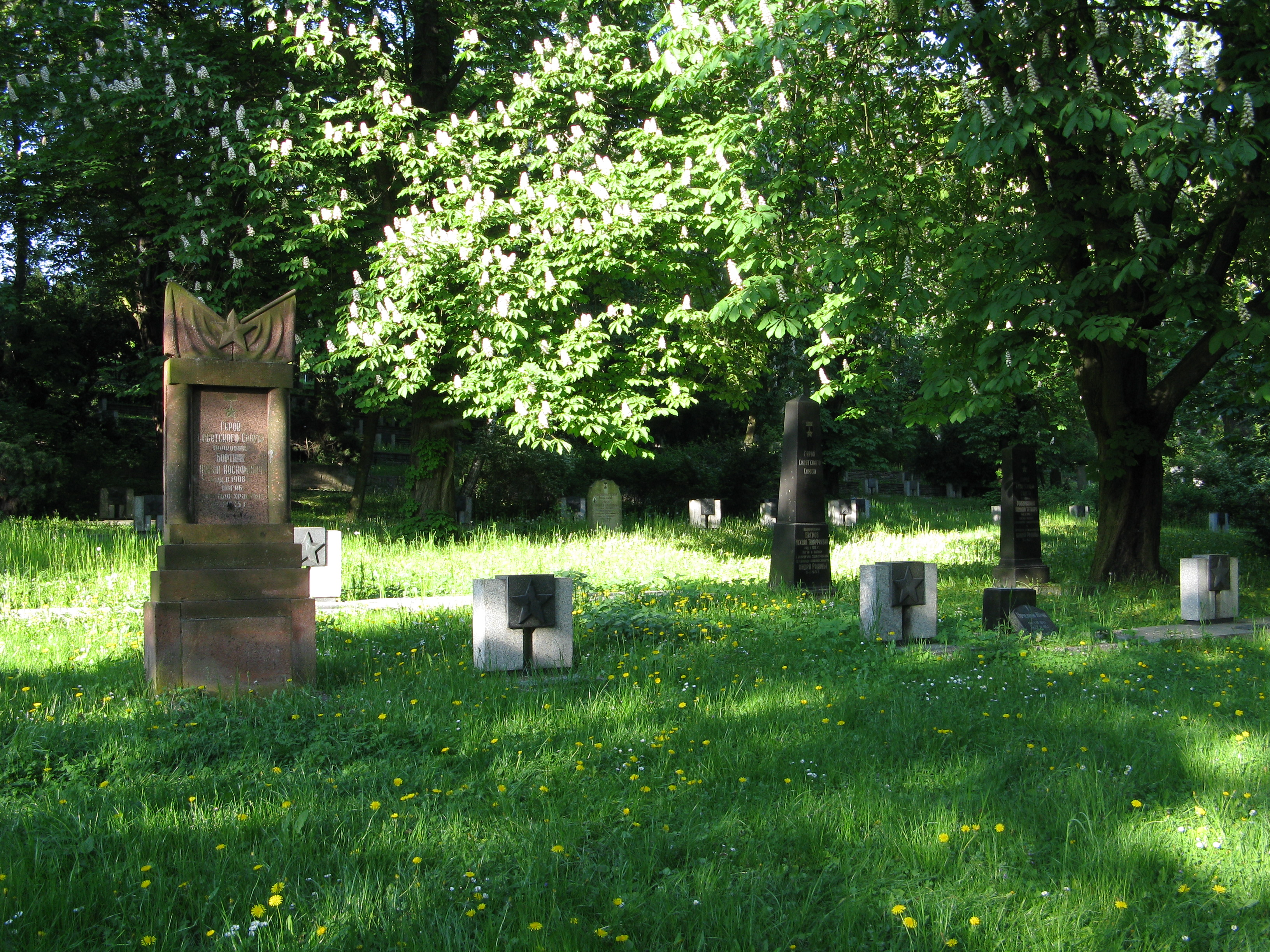 Poznań, ul. Armii Poznań - cytadela z parkiem i cmentarzami (zabytek ne A 006)